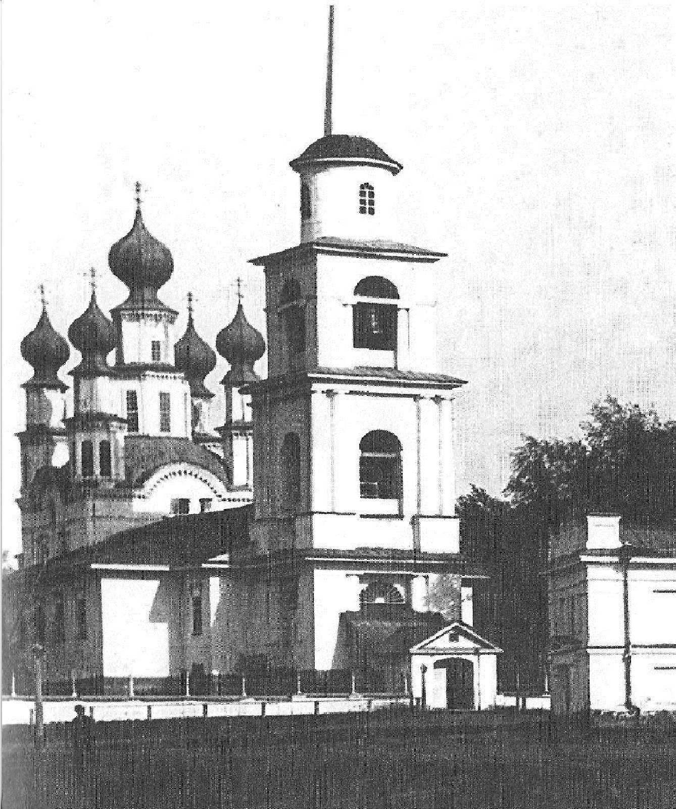 Построен в 1775 году